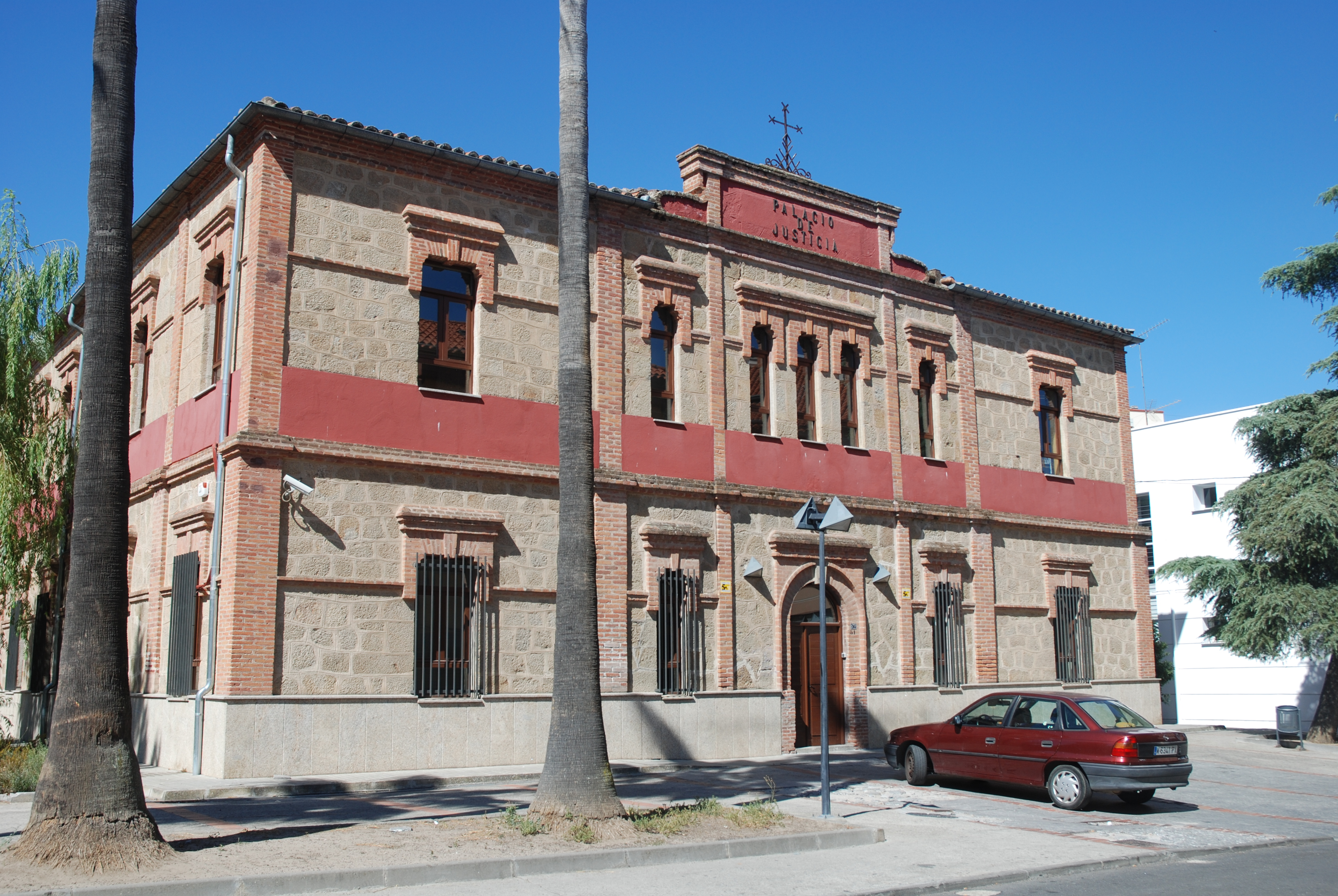 Juzgados (Navalmoral de la Mata)